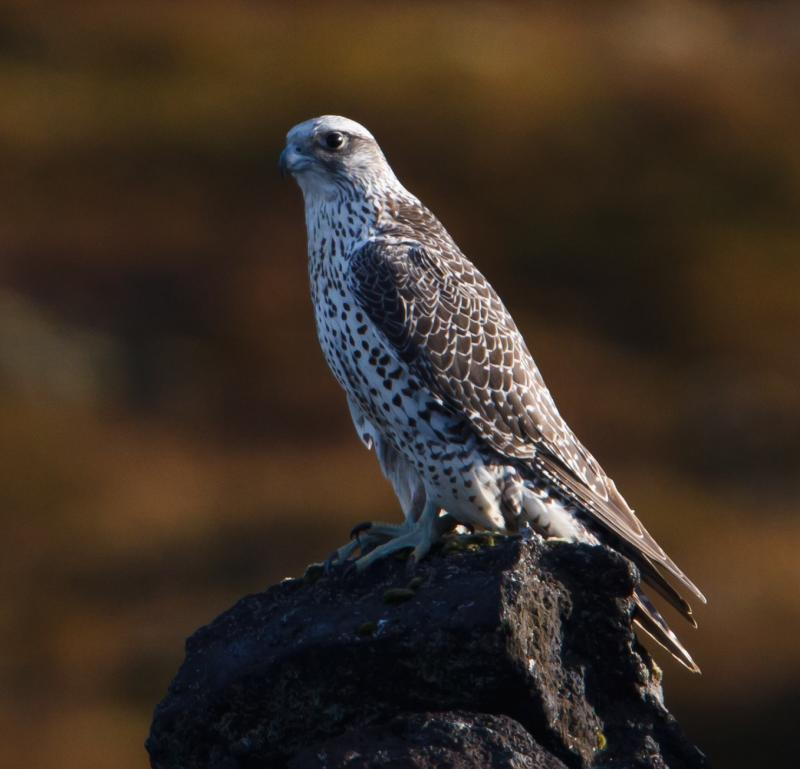 Gyr falcon - Falco rusticolus